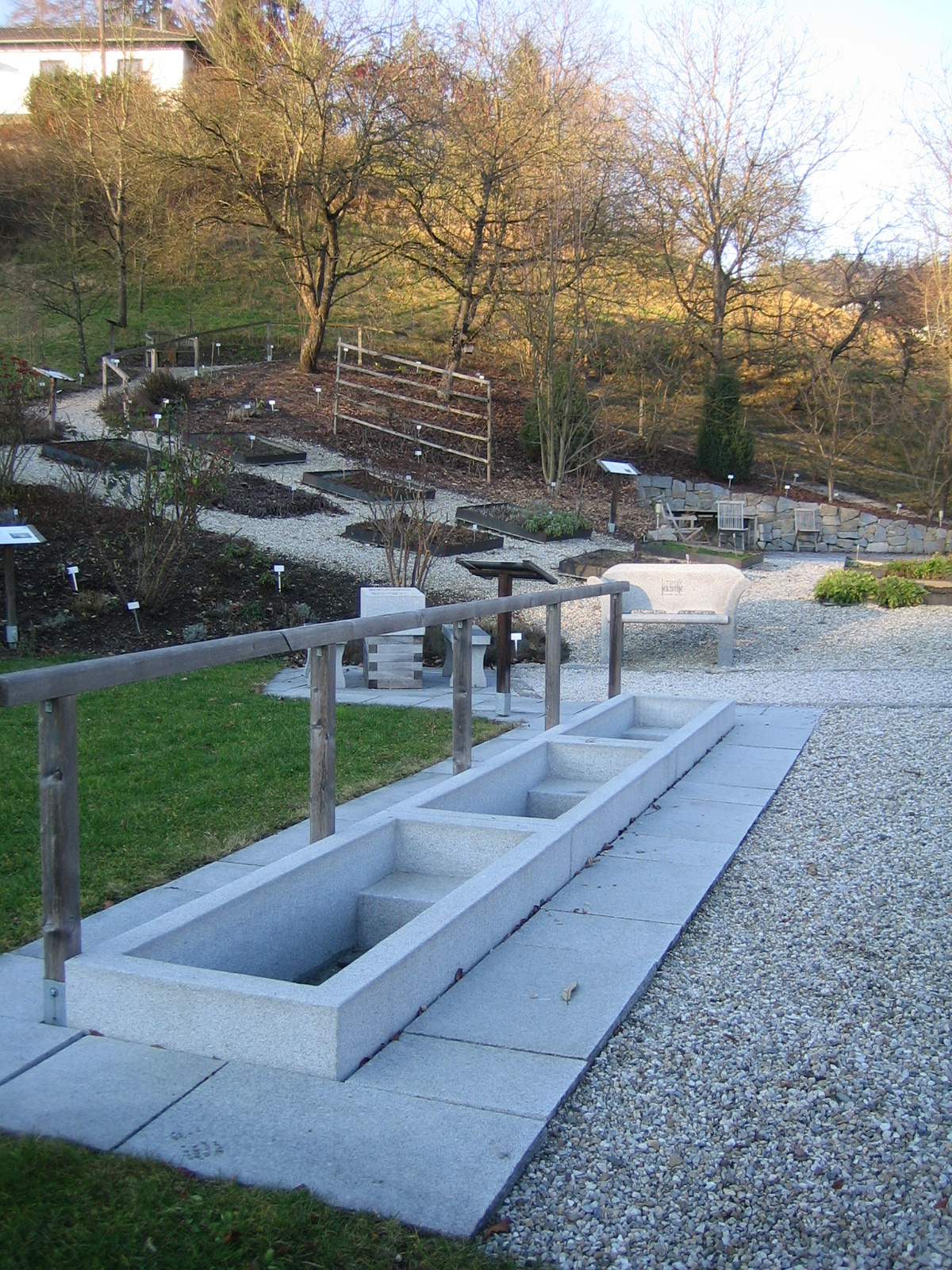 Kneippen in Bad Mühllacken & Blick auf Beete